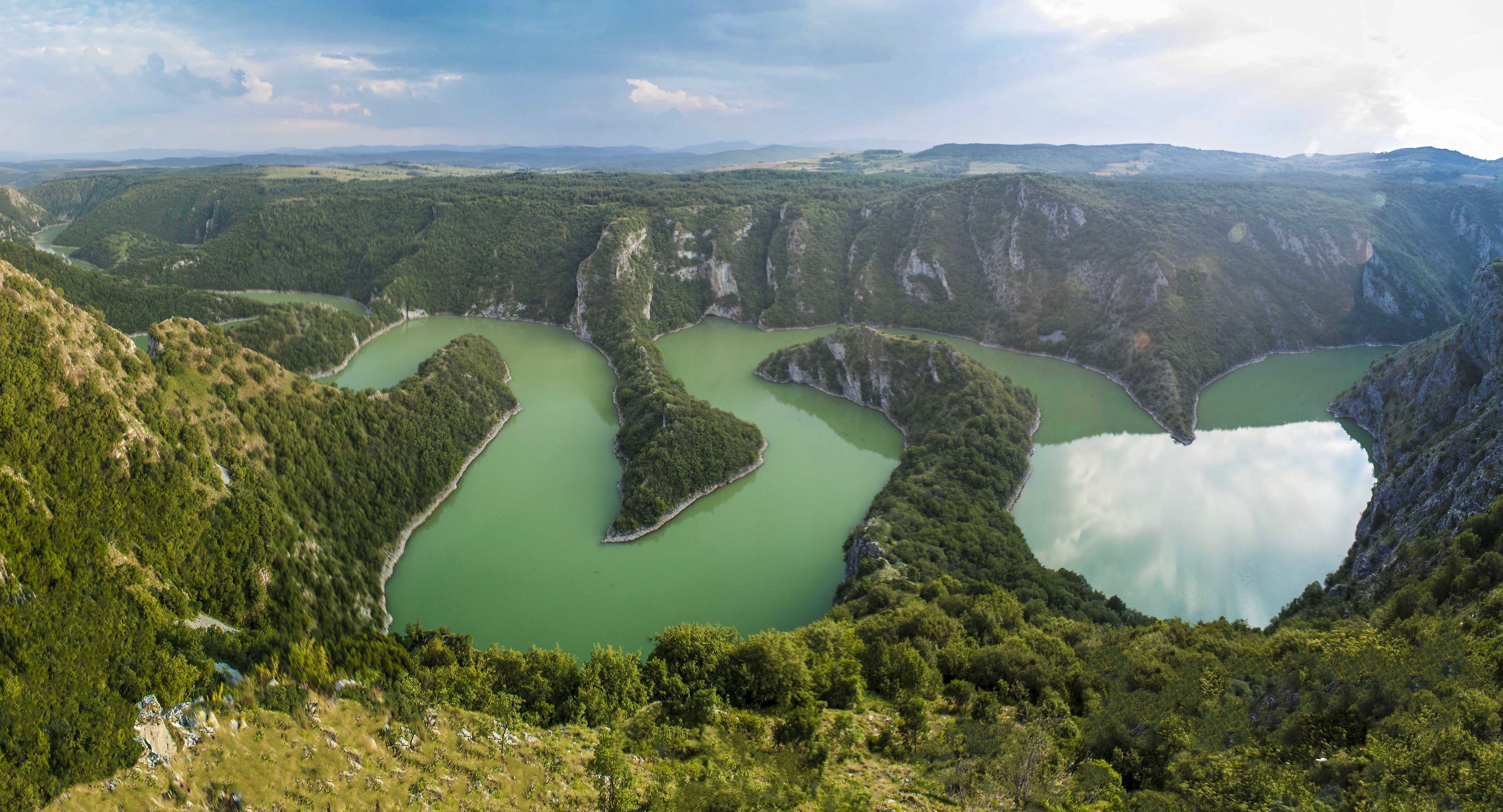 Српски (ћирилица): Специјални резерват природе Увац Ово је фотографија заштићеног природног добра у Србији под шифром: РП43 This is a a photo of a natural area in Serbia with ID: РП43